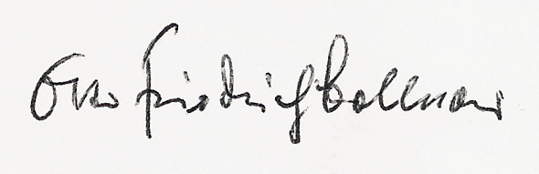 Signatur 29.5.1982 seiner handschriftlichen Widmung des mir übergebenen ersten Bandes seiner »Studien zur Hermeneutik«